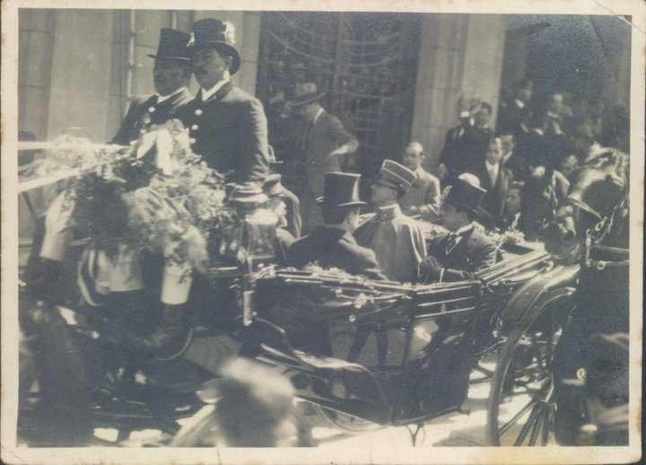 El gobernador de Tucumán, Miguel Mario Campero acompaña al Principe Heredero de Italia, Humberto de Saboya, al momento de llegada a la Casa de Gobierno de Tucumán. Agosto de 1924.